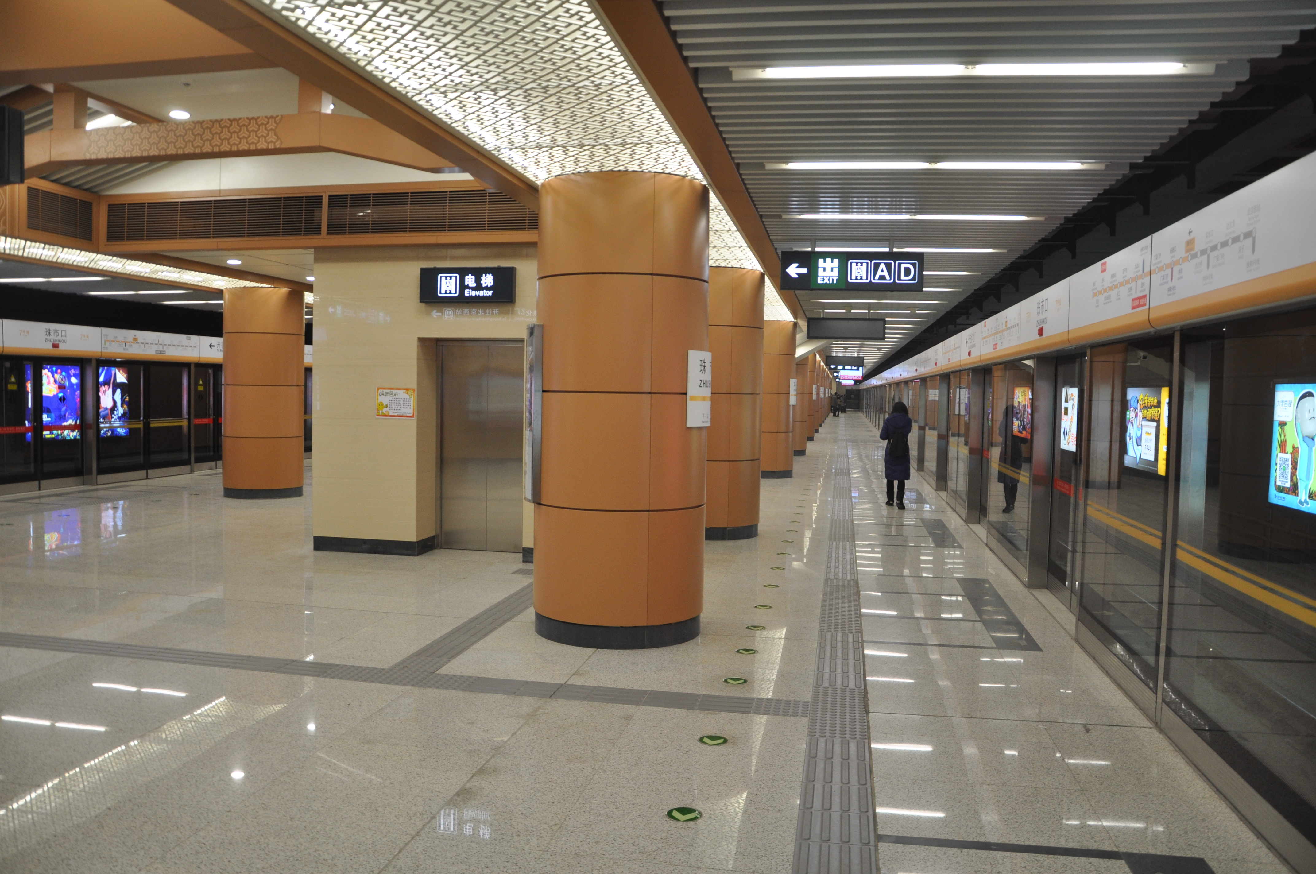 北京地铁7号线珠市口站站台。